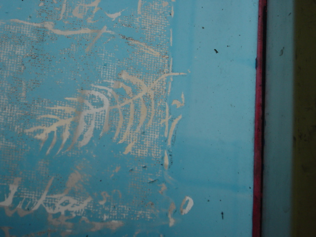 Silkscreen